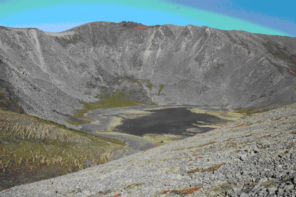 Вулкан Аку, Каларский район This image is related to the protected area of Russia number 7510044